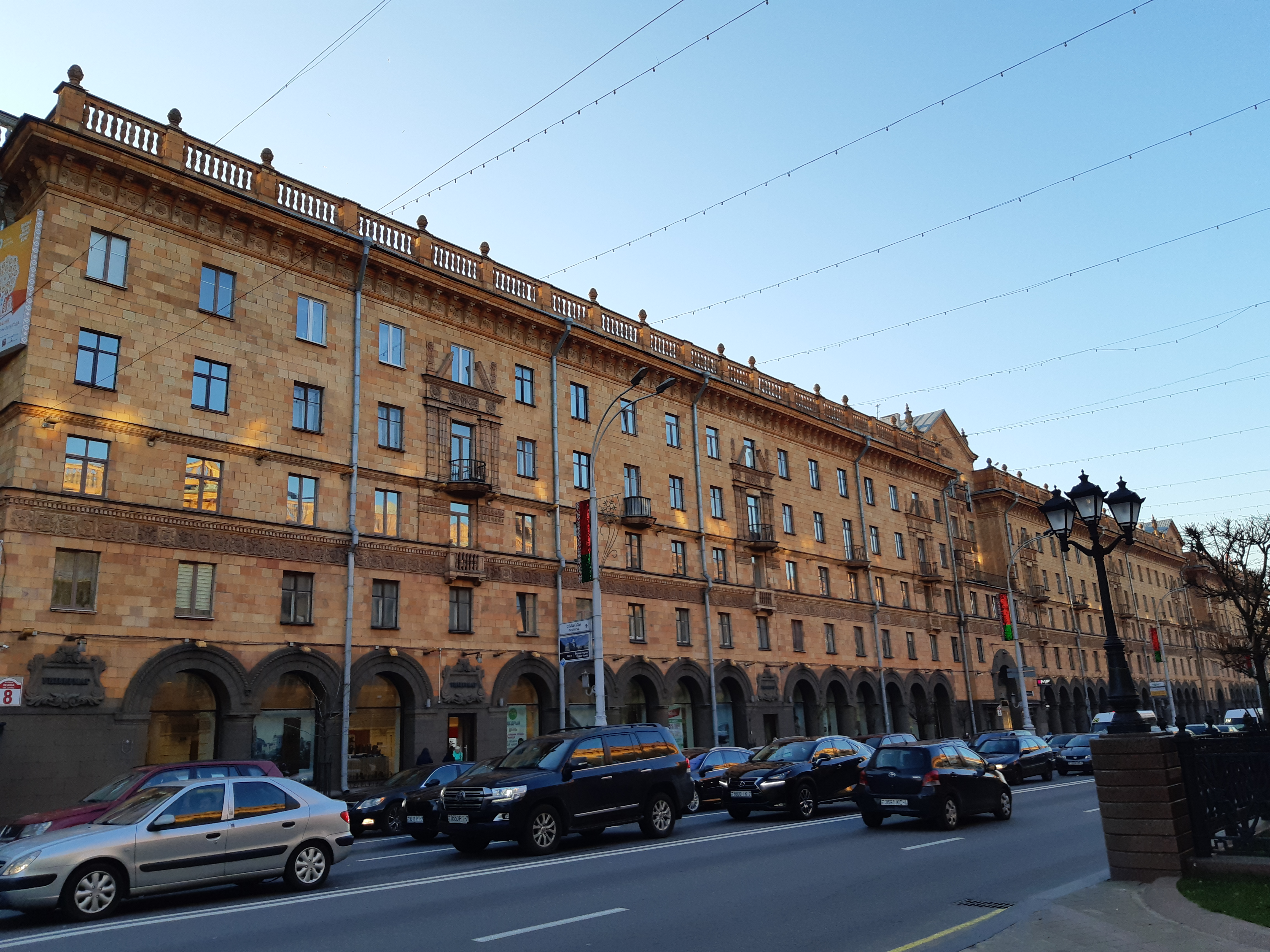 Minsk : Immeuble rue Lénine